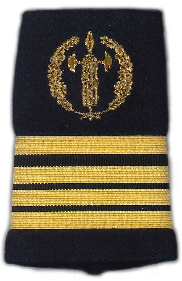 Grade officier greffier principal de la justice militaire